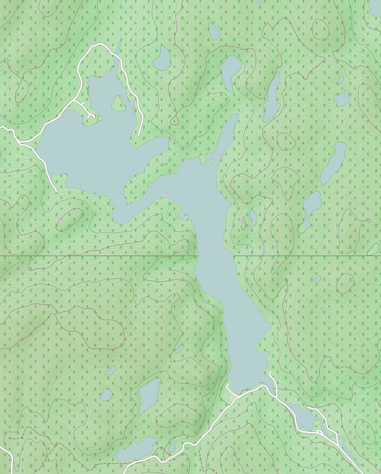 Carte du lac du Jésuite